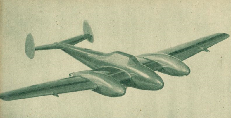 Vindtunnelmodell av Saab 24